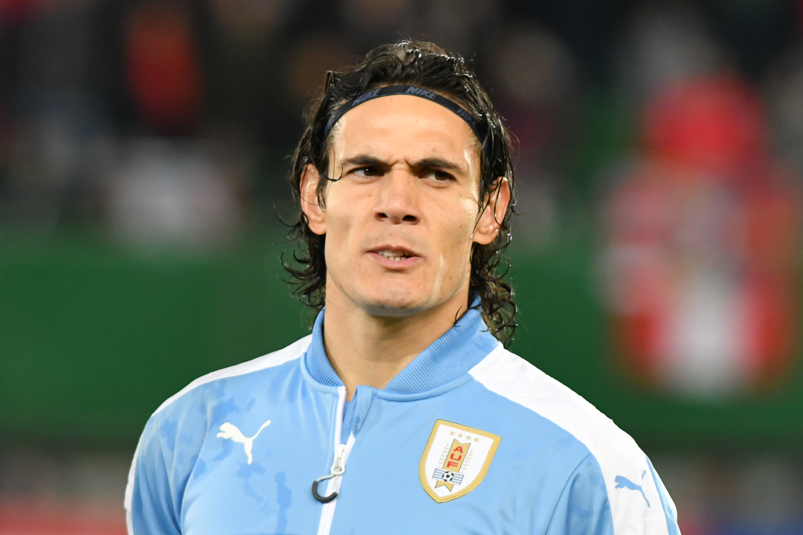 Wien, Österreich, 14.11.2017, Sport, Fussball, OEFB Freundschaftliches Laenderspiel - Österreich vs Uruguay. Bild zeigt Edinson Cavani (URU).